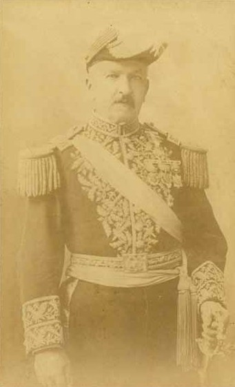 Manuel Jesús Baquedano González (Santiago, 1 de enero de 1823 - 30 de septiembre de 1897) fue un militar y presidente chileno, comandante en jefe del Ejército durante la Guerra del Pacífico. Fue hijo del Capitán de la Escolta Directorial Fernando Baquedano Rodríguez (1796-1862) y de Teresa González Res